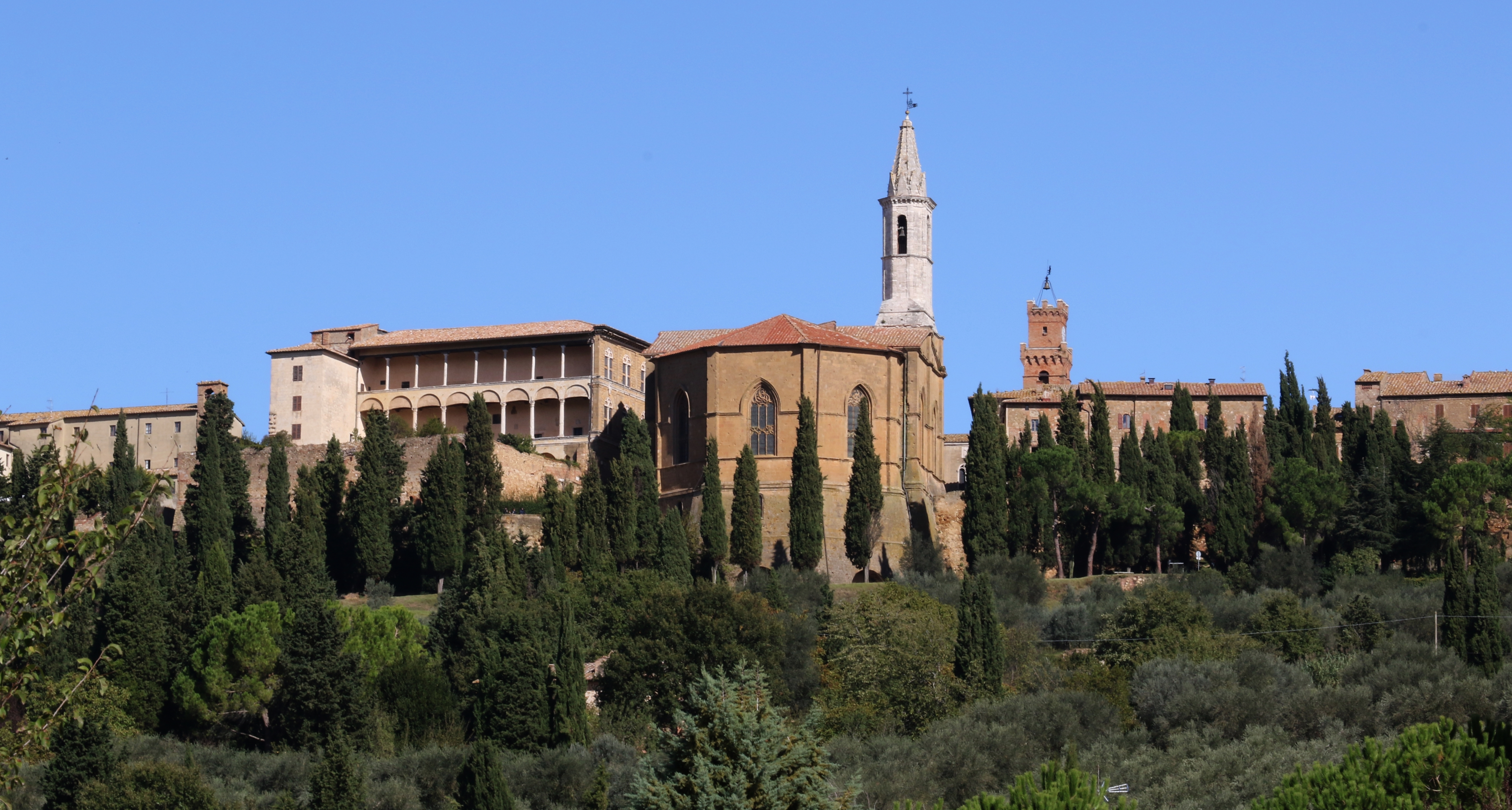 Pienza - Val d'Orcia UNESCO World Heritage Site (1996)